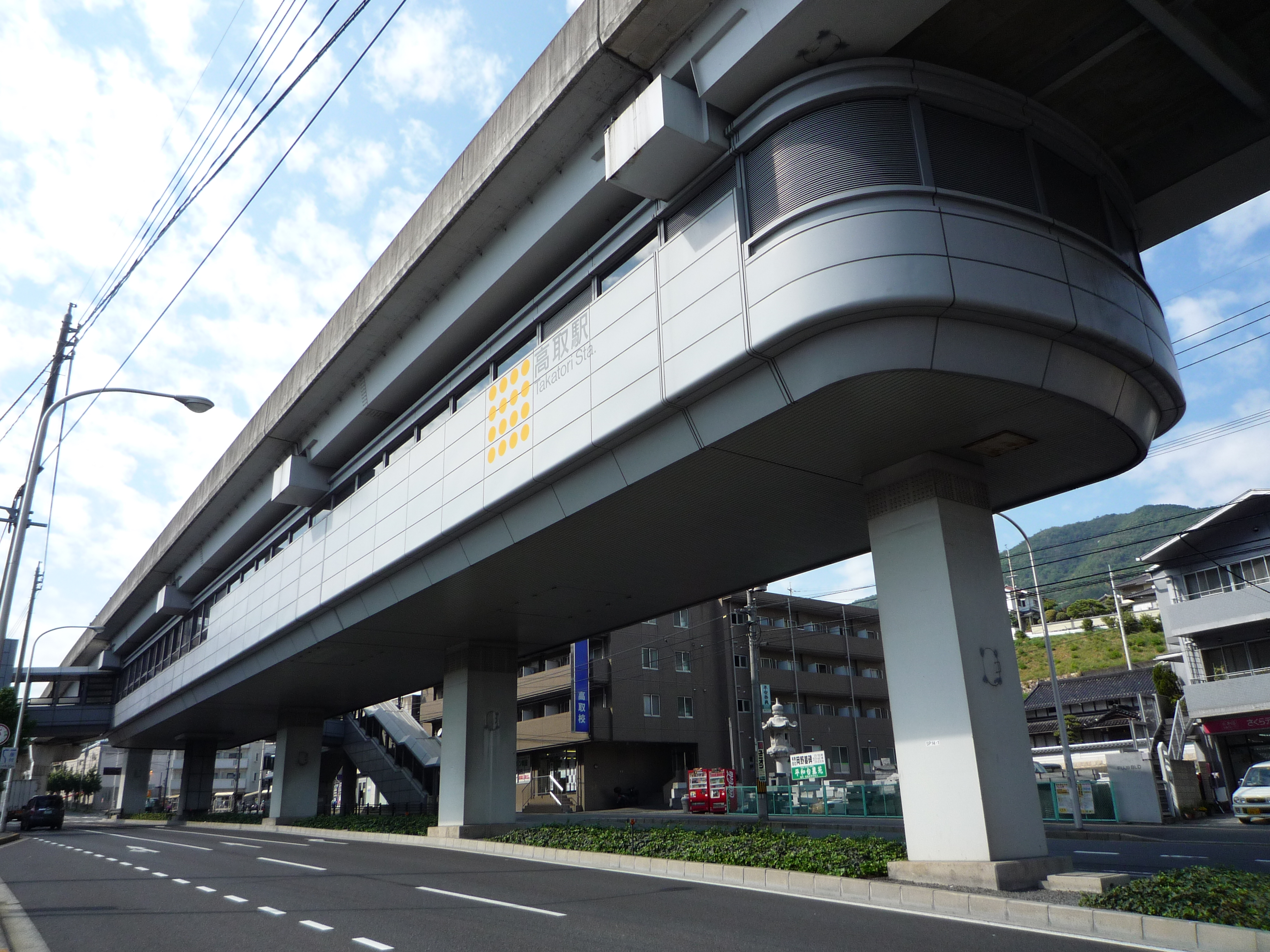 高取駅